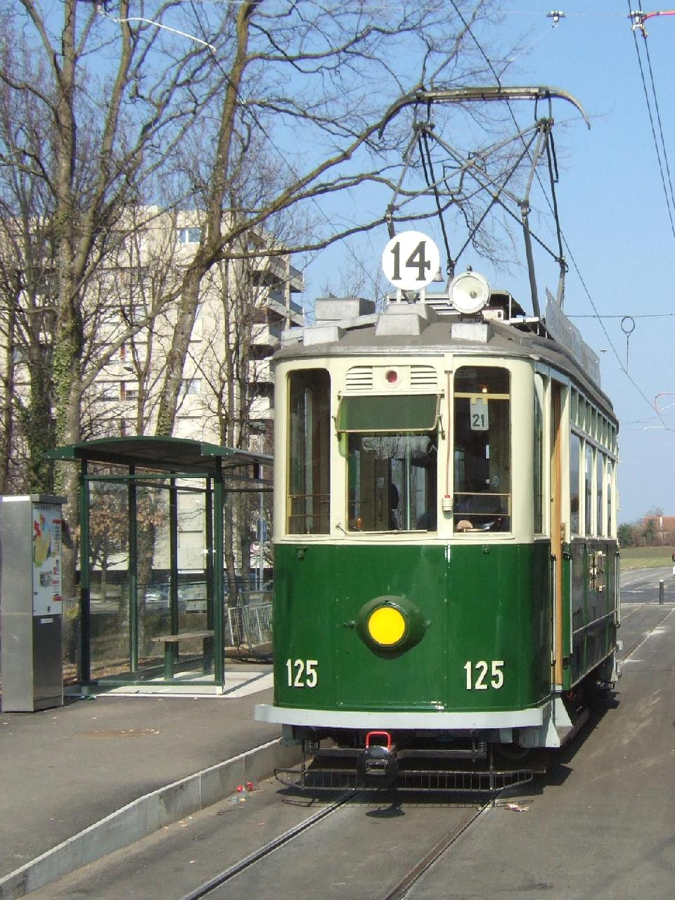 Historischer Strassenbahn Motorwagen Ce 2/2 125 der ehemaligen Compagnie Genevoise des Tramways Électriques (CGTE), heute Transports Publics Genevois (TPG), als Dauerleihgabe der Museumsbahn Blonay-Chamby (BC) in Obhut der Association Genevoise du Musée des Tramways (AGMT) in Meyrin Gravières im Sommer 2010.